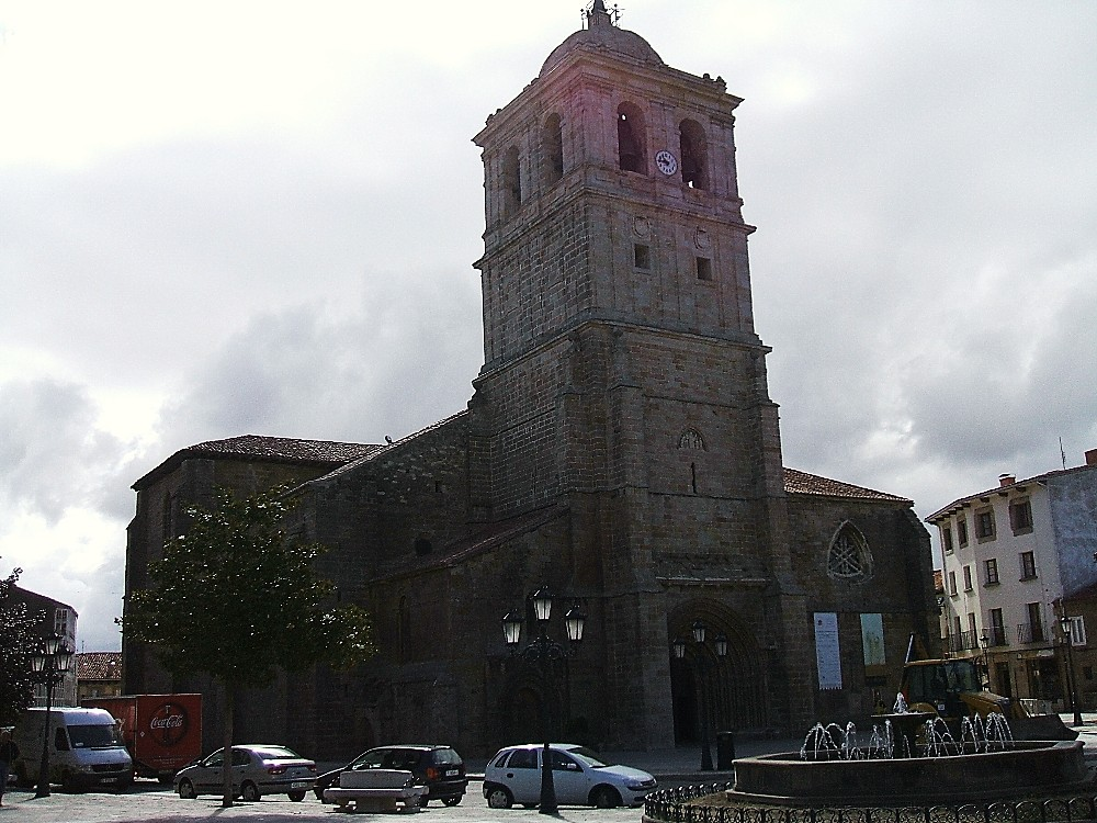 Colegiata de San Miguel Arcángel, Aguilar de Campoo, Palencia, España